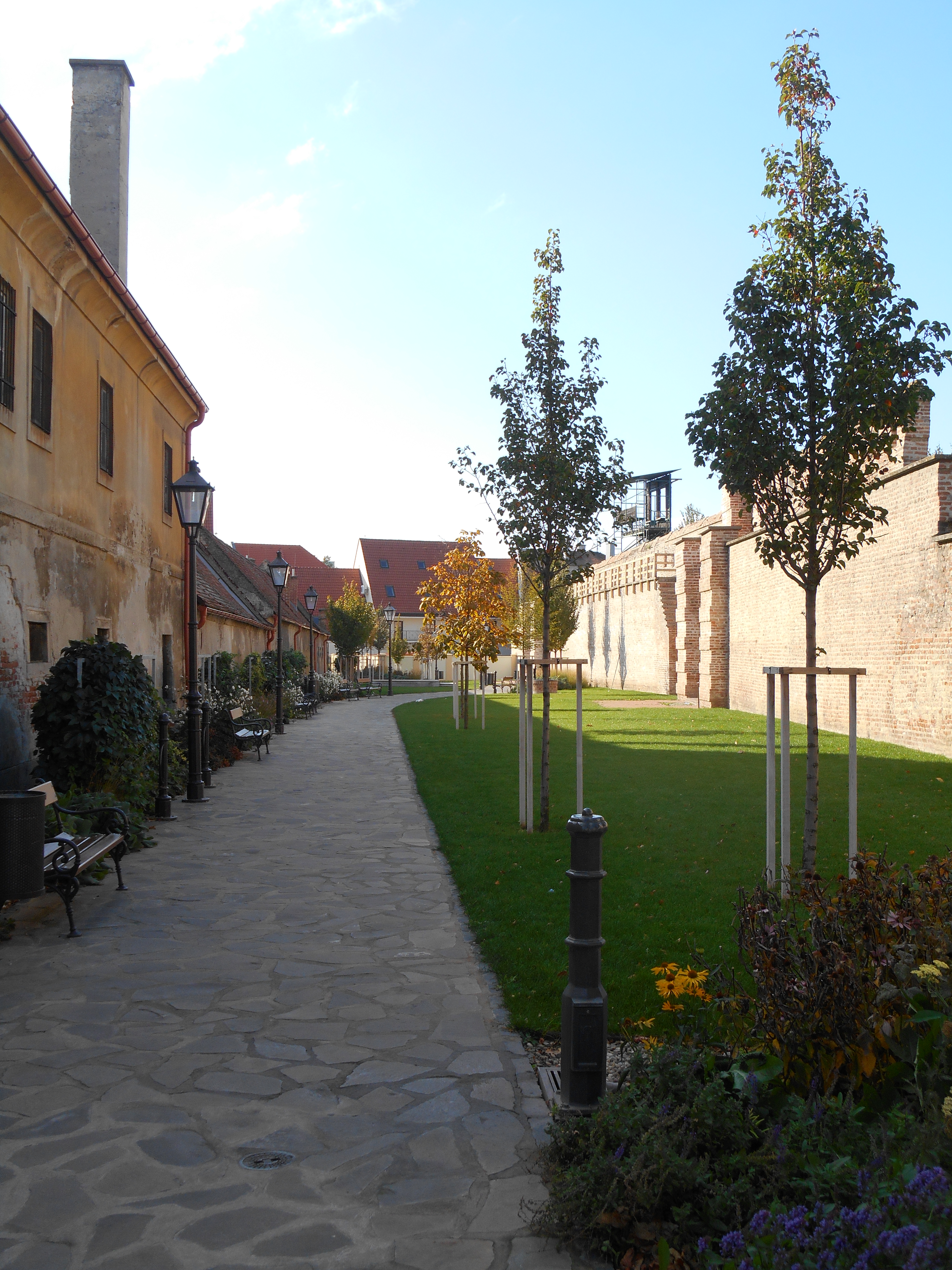 Slovakia - Trnava - Parčík Bela IV